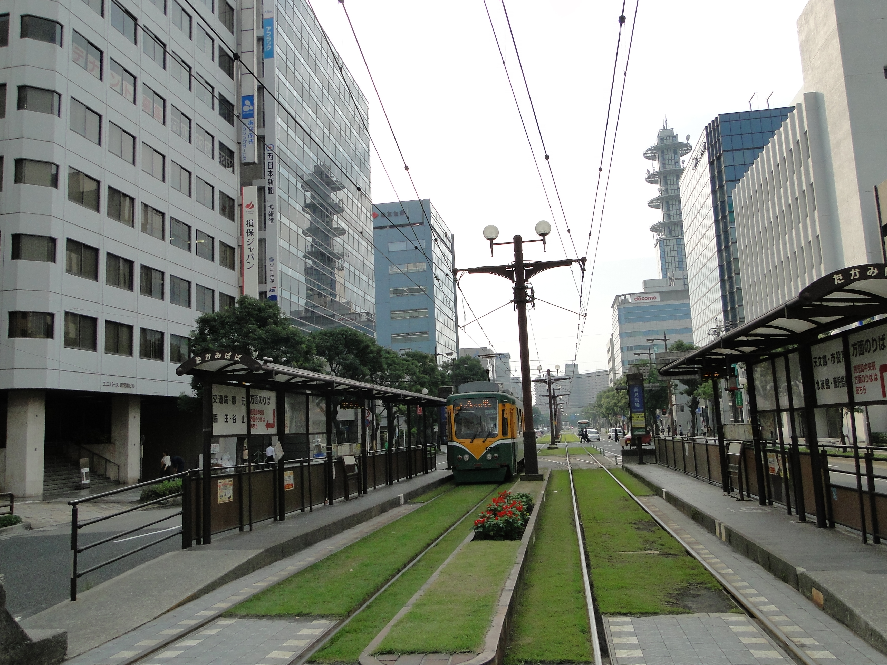 高見馬場